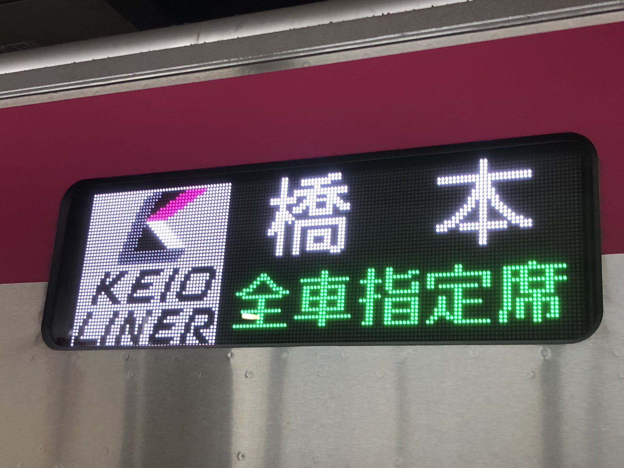 京王5000系のフルカラーLED表示器 KEIO LINER 橋本 全車指定席